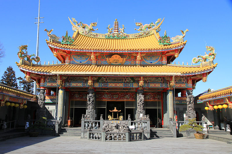 Bâtiment principal du Seitenkyū.